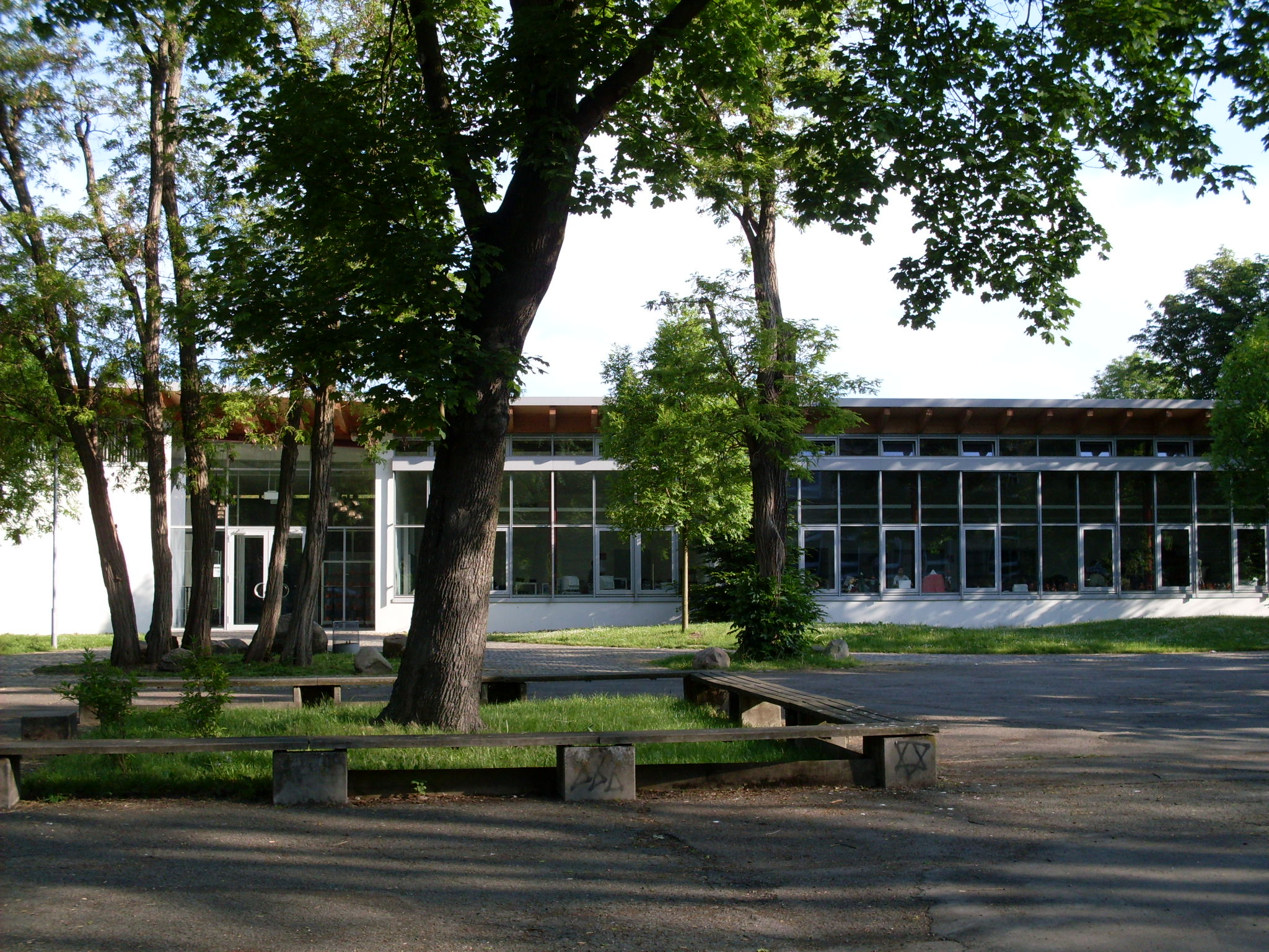 Frontansicht der Großen Schule Wolfenbüttel